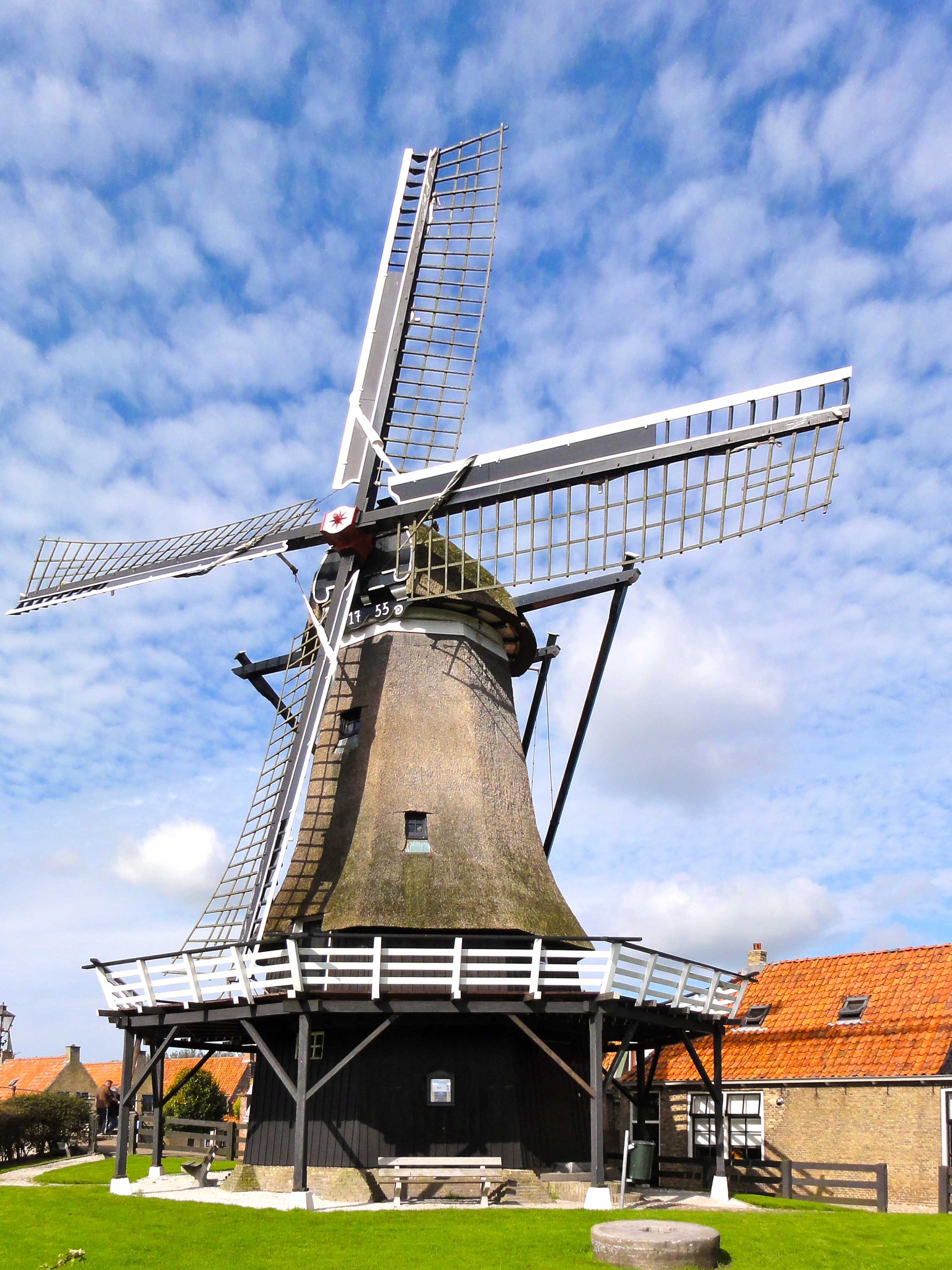 Molen de Kaai te Sloten